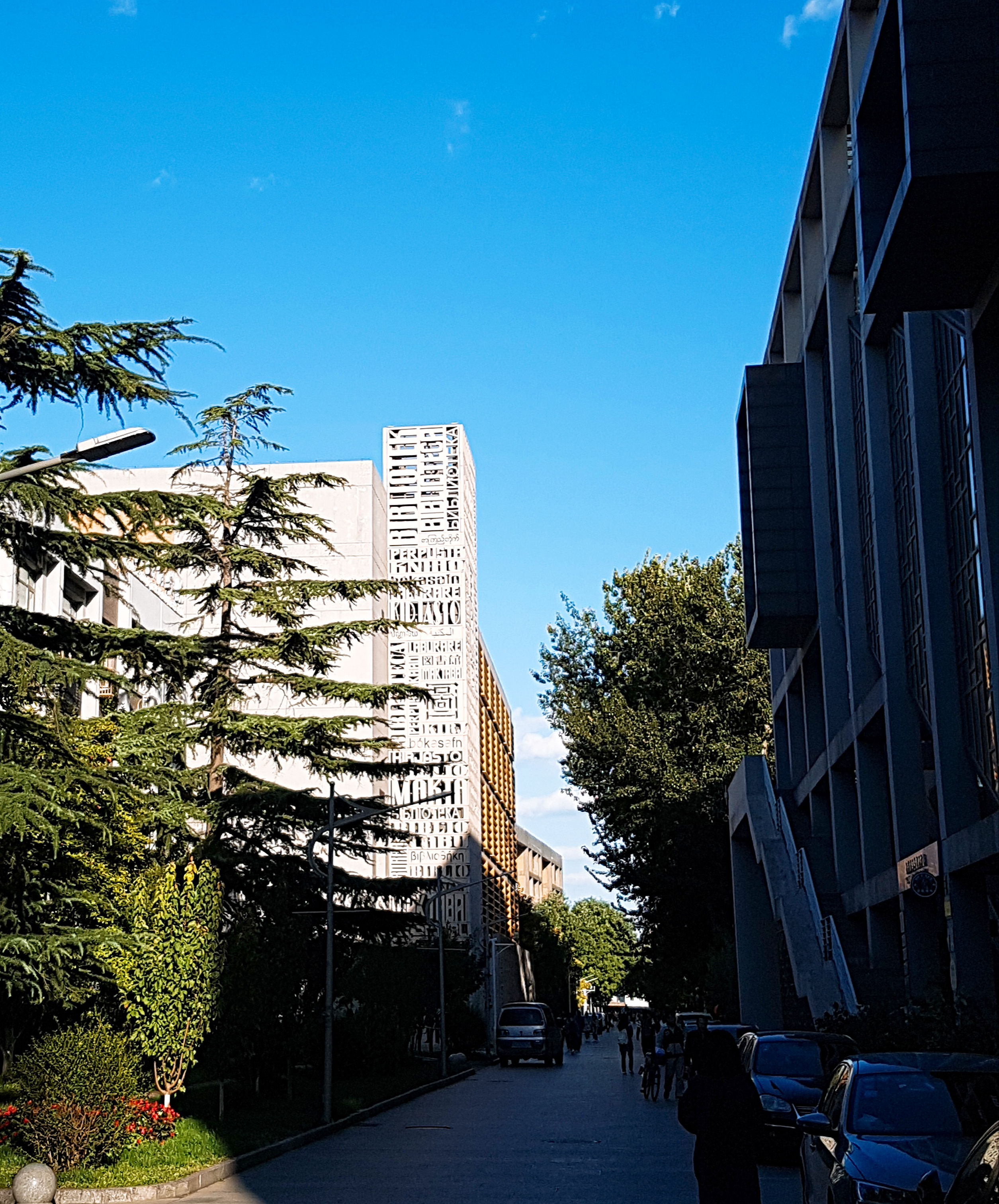 北京外國語大學圖書館